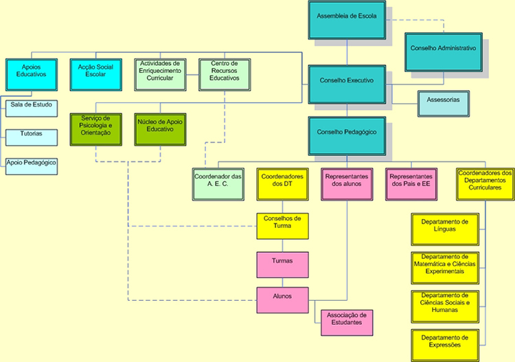 Organograma.